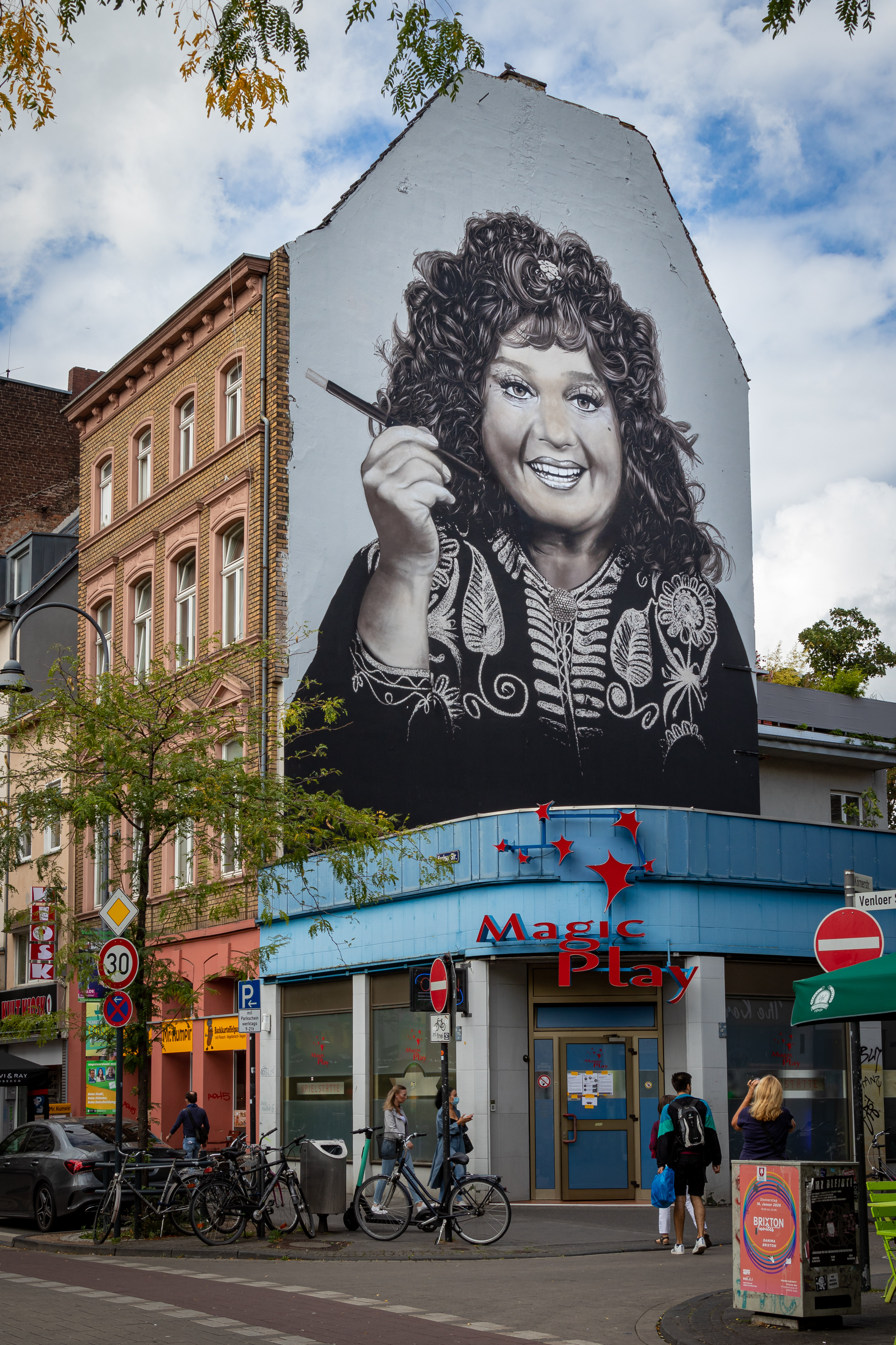 Wandgemälde "Trude Herr" von Size Two auf der Venloer Straße 274 in Köln-Ehrenfeld